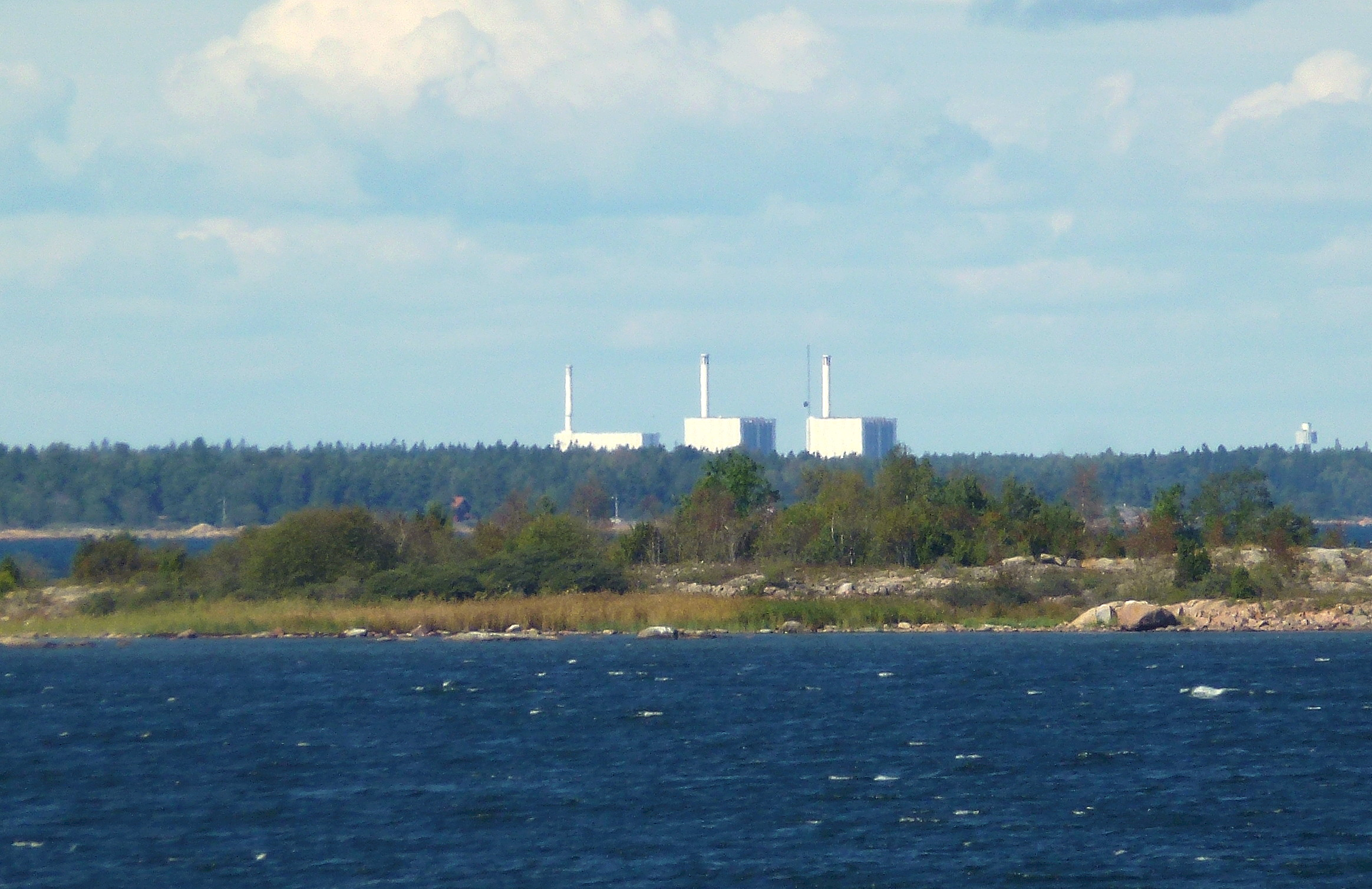 Forsmarks tre kärnreaktorer sedd från Öregrund